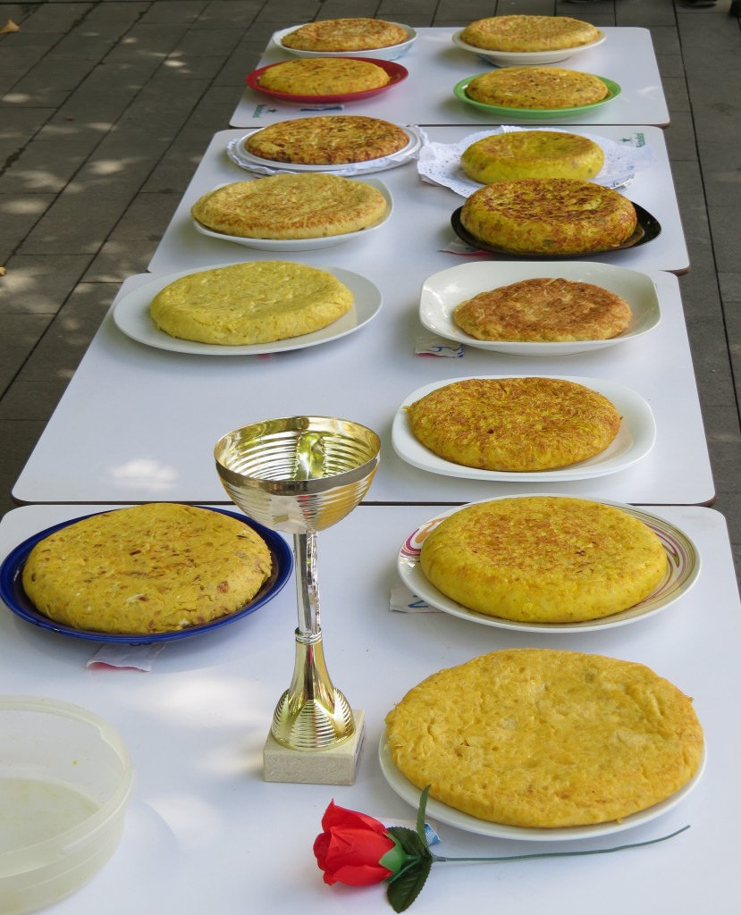 Moskuko Jaiak 2015. Concurso de Tortilla.